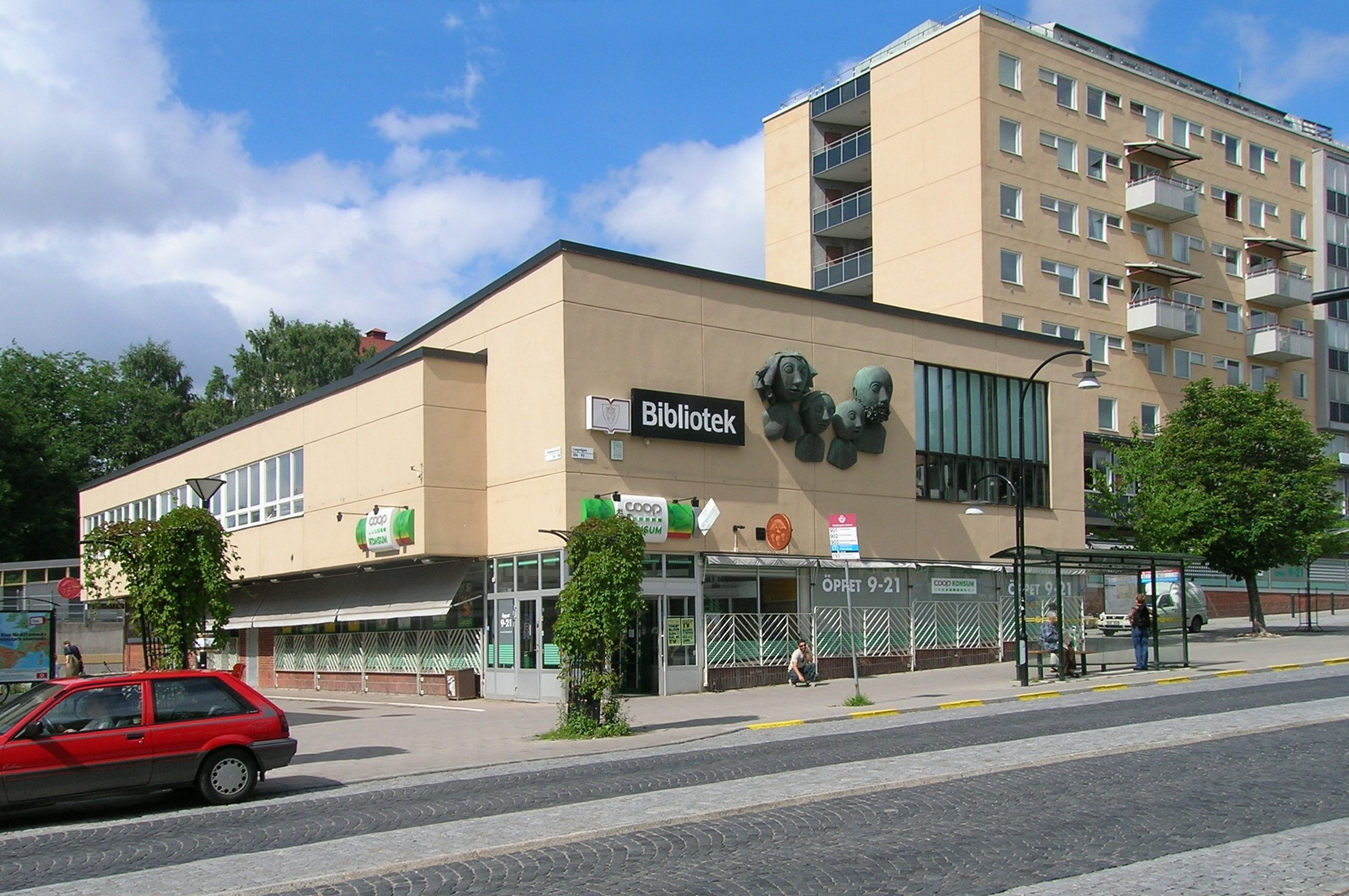 Gubbängens centrum, Stockholm